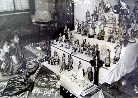 బొమ్మల కొలువు (1950-54)